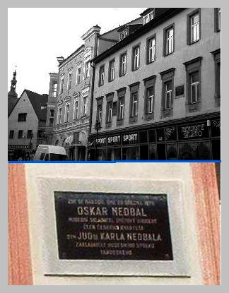 Česky: Rodný dům Oskara Nedbala - Tábor, Palackého 355.